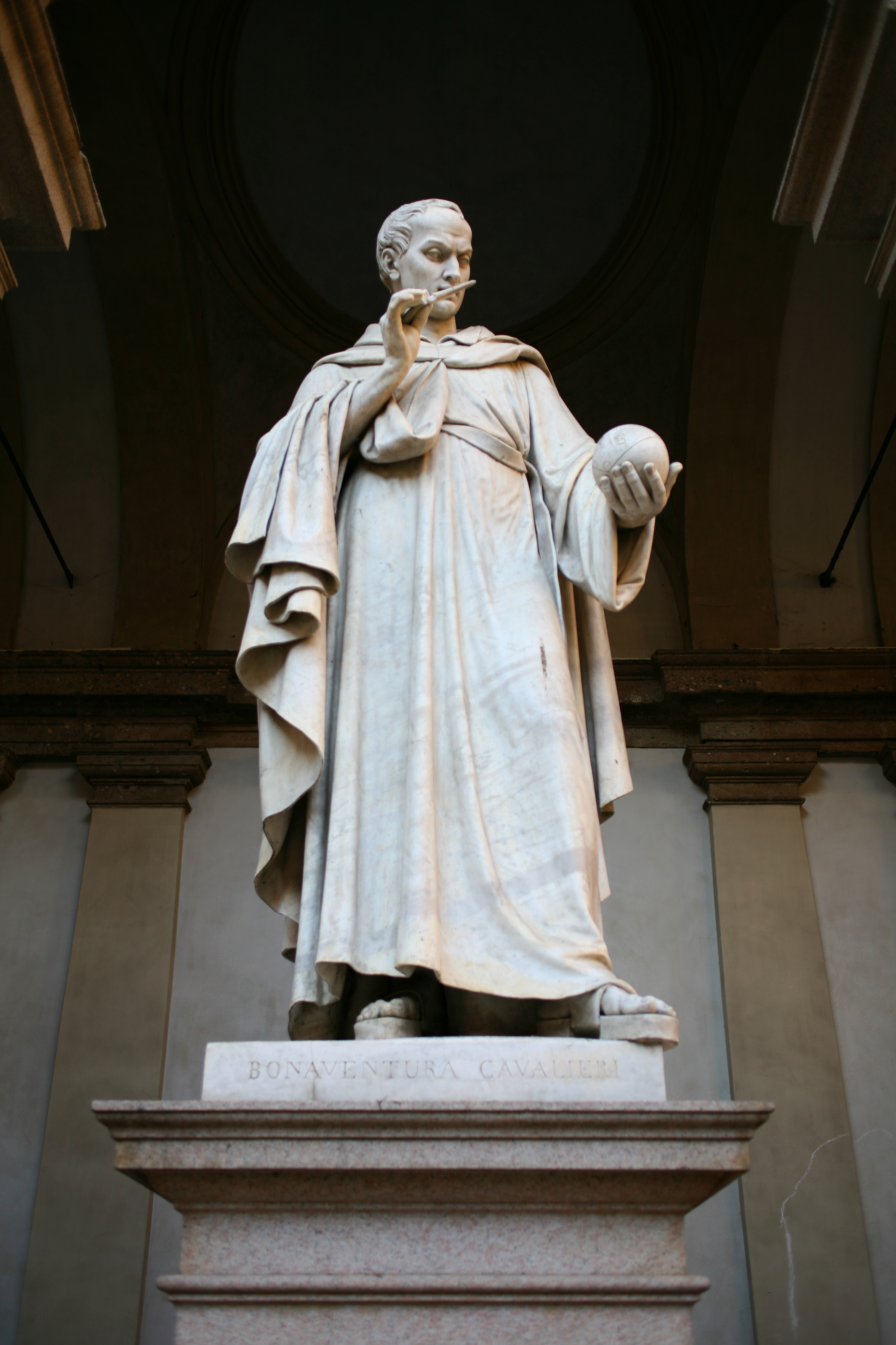 Giovanni Antonio Labus, Monumento a Bonaventura Cavalieri (1844), Accademia di Brera, Milano